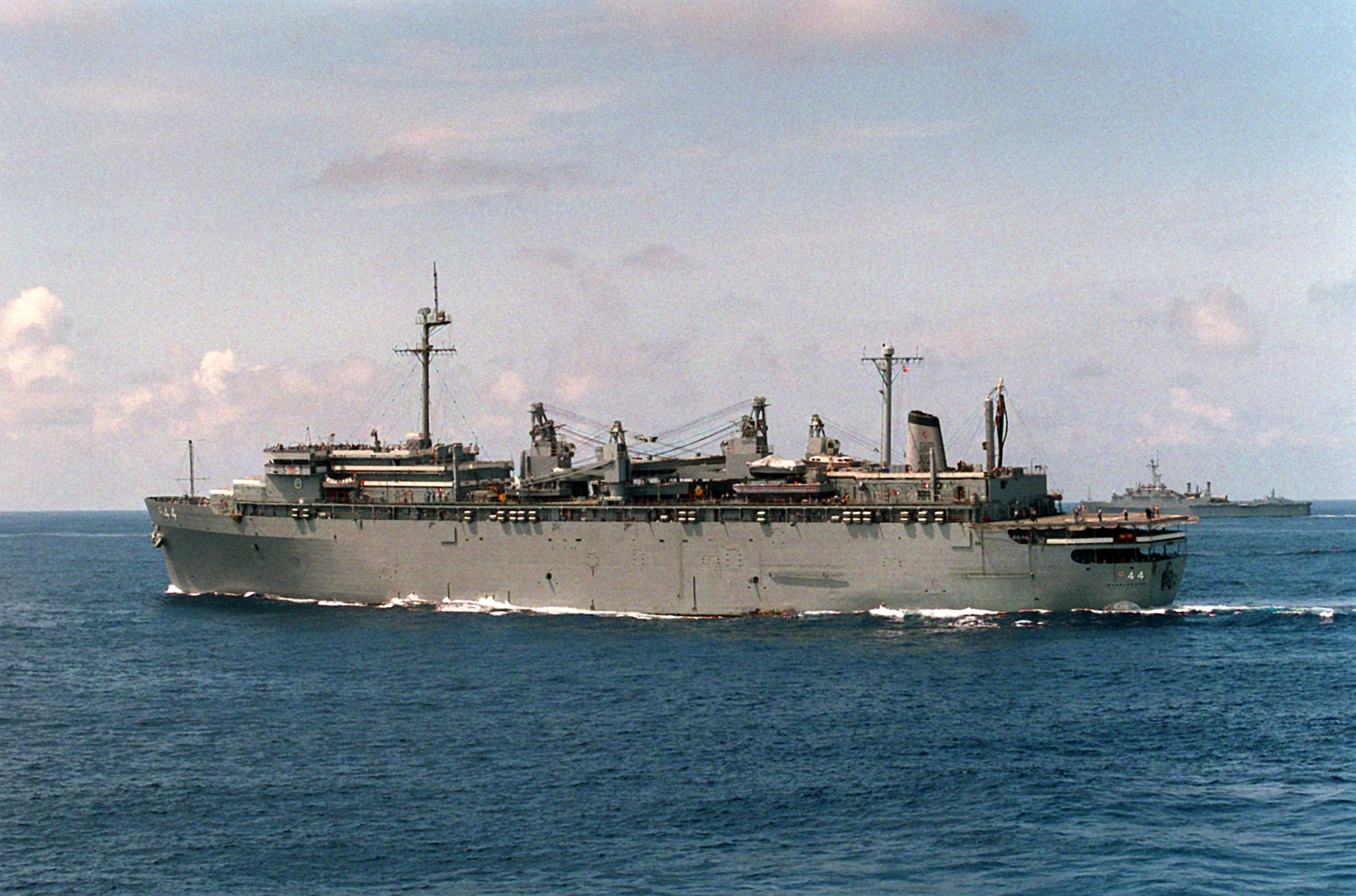 The U.S. Navy destroyer tender USS Shenandoah (AD-44) underway, in 1989.